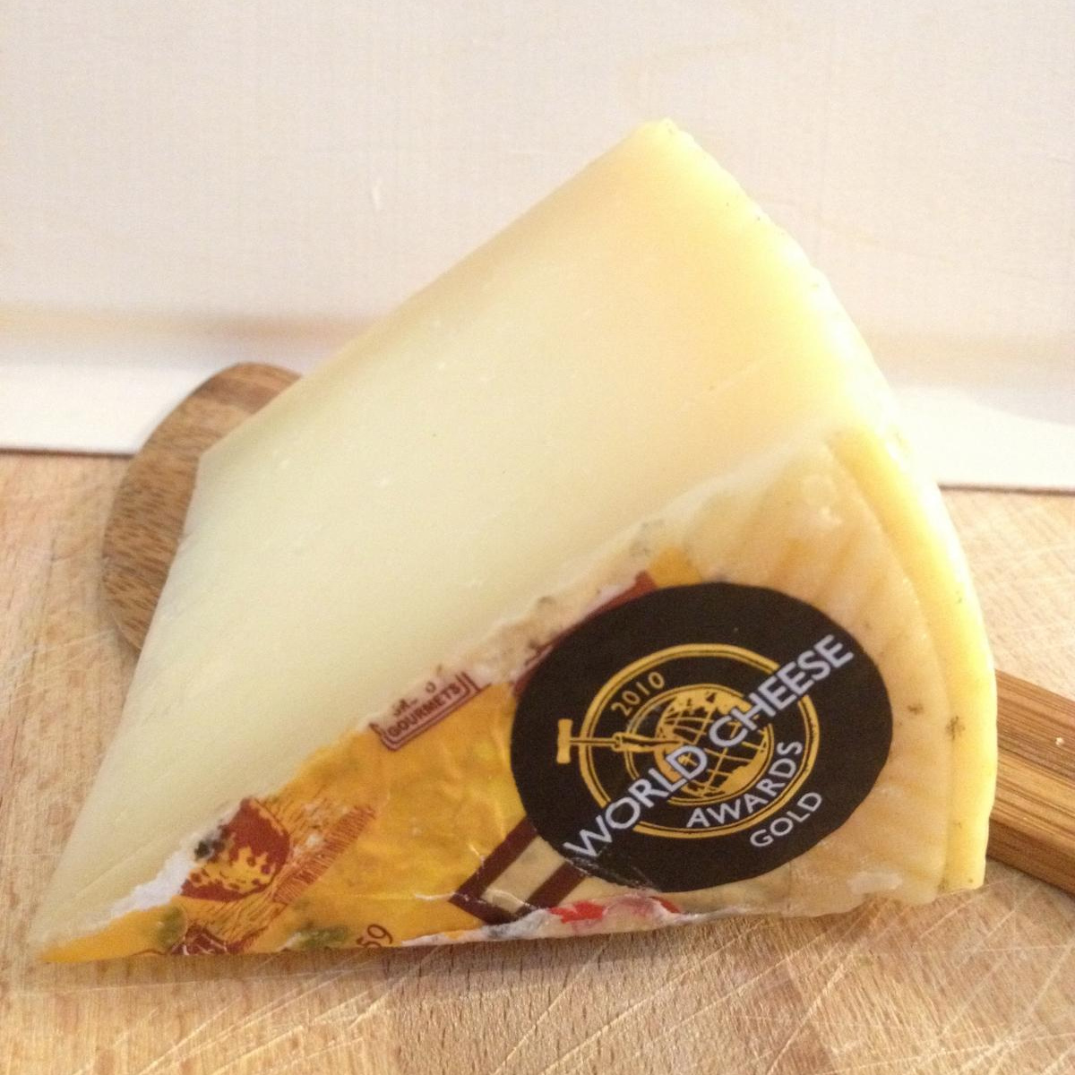 Queso Payoyo, de cabra, elaborado en Villaluenga del Rosario (Cádiz, España). Contenido del envío del Club del Queso Mumumío de septiembre.